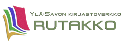 Ylä-Savon kirjastoverkko Rutakon logo